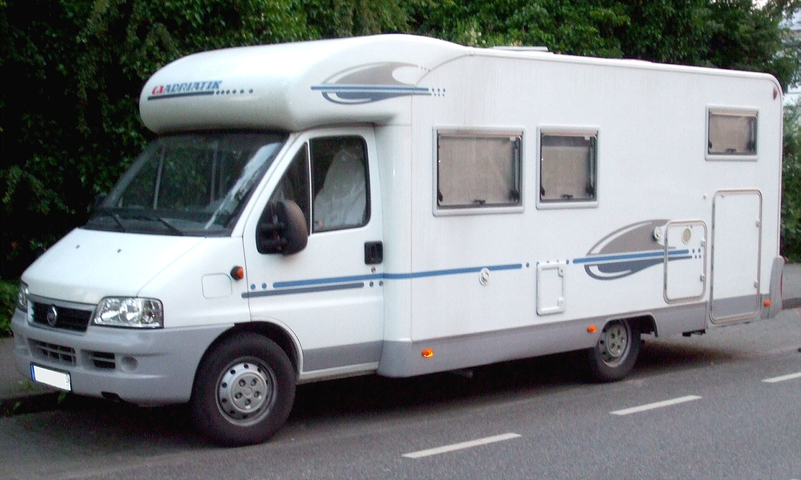 Wohnmobil Adriatik auf Basis eines Fiat Ducato Transporters (wahrscheinlich ein teilintegriertes und nicht wie der Dateiname vermuten läßt ein Alkoven-Wohnmobil)